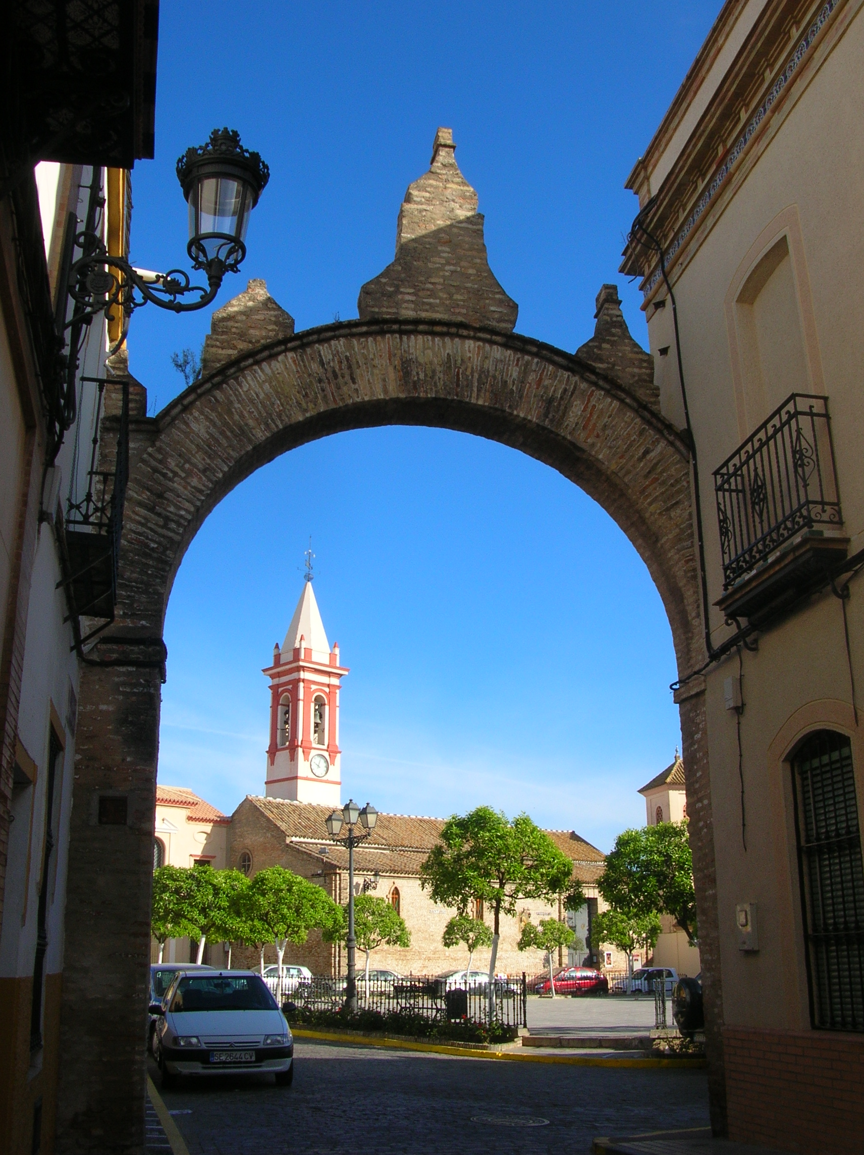 Castilleja de la Cuesta (Andalucía, España)